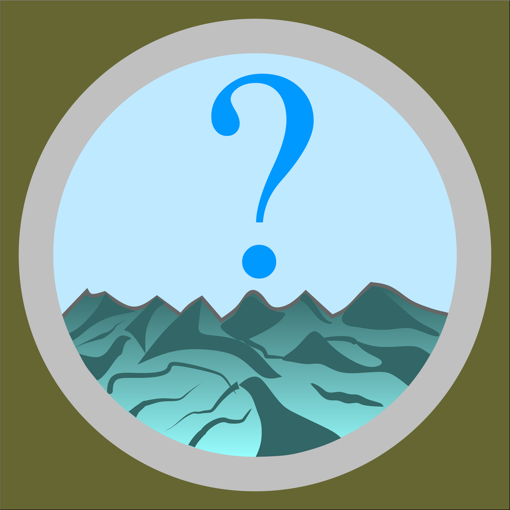 Znak malowany na samolotach eskadry szkolnej Morskiego Dywizjonu Lotniczego, stosowany w latach 1927 - 1932